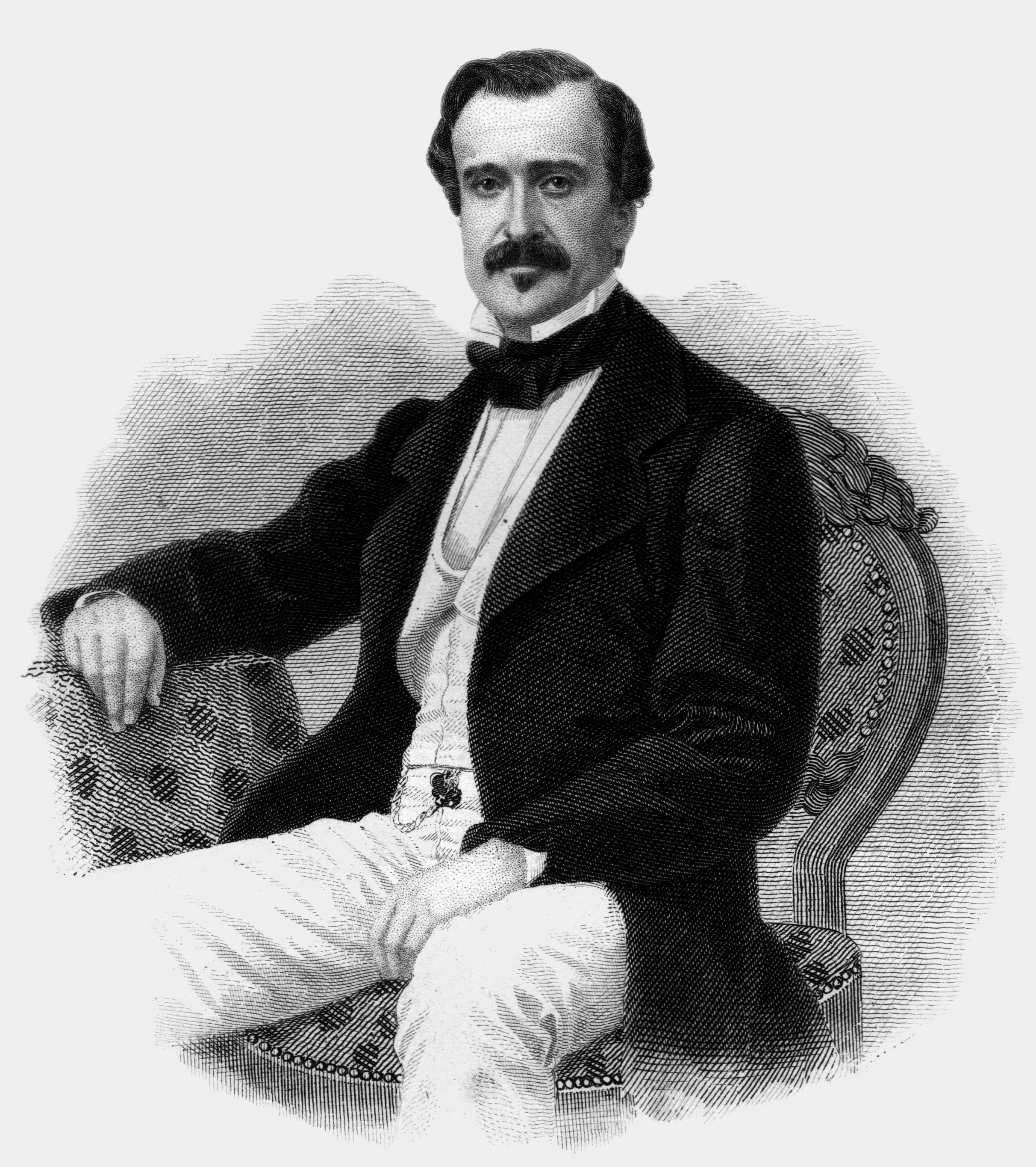 Léonel de Moustier (1817-1869), homme politique français.